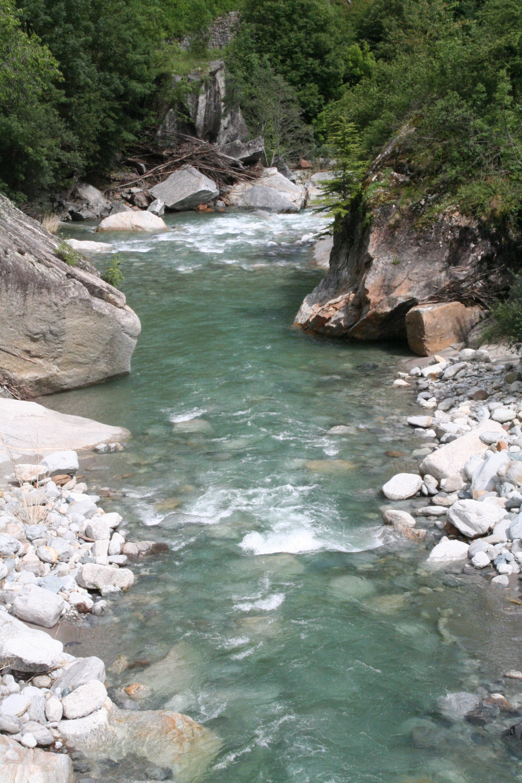 Brenno (Fluss bei Motto/Lodiano; Summer 2011